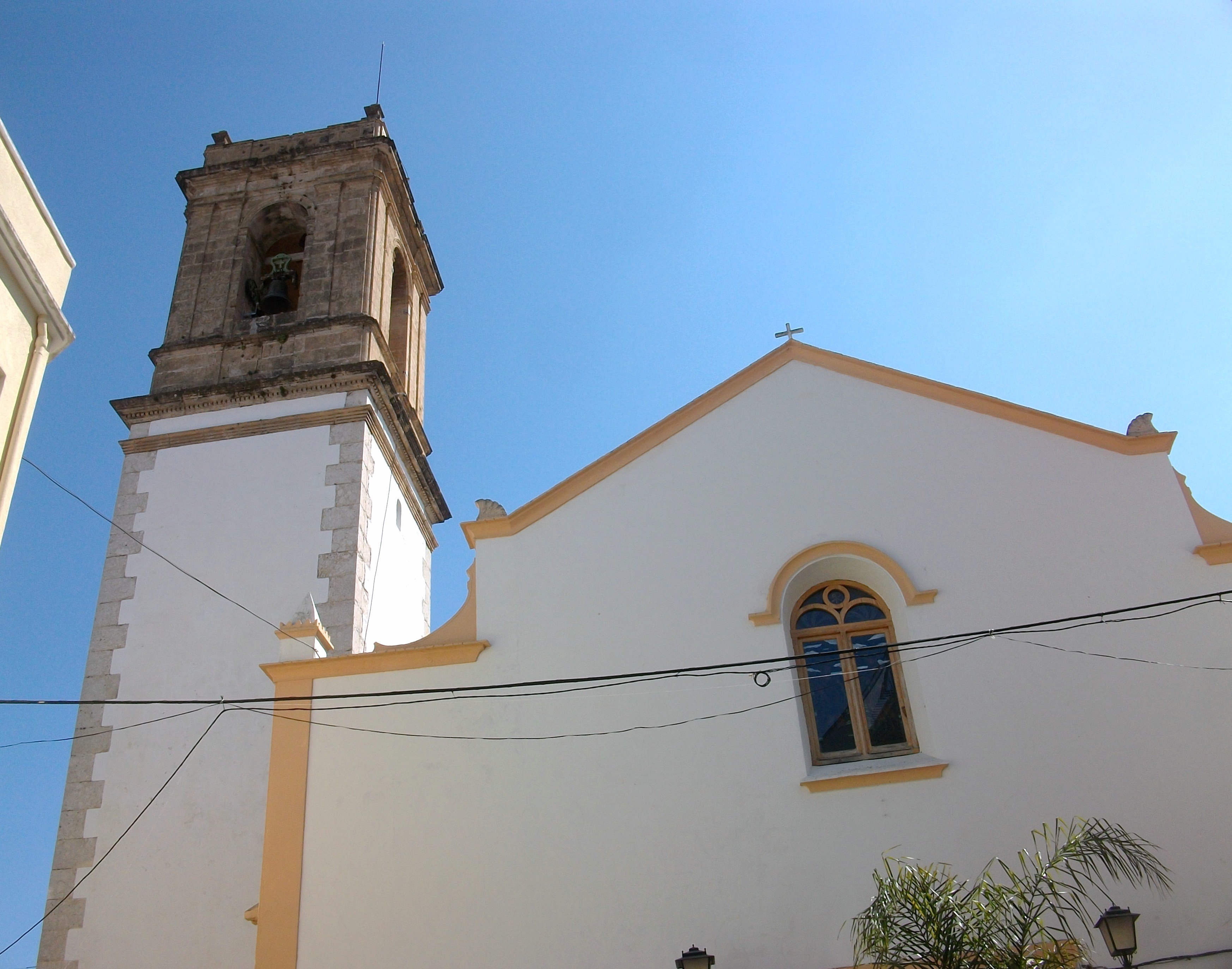 Església de la Nativitat del Senyor d'Orba, Marina Alta.